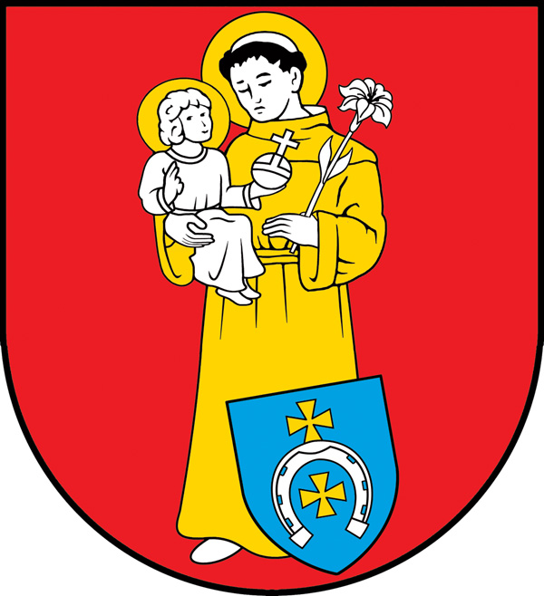 Herb gminy Szumowo